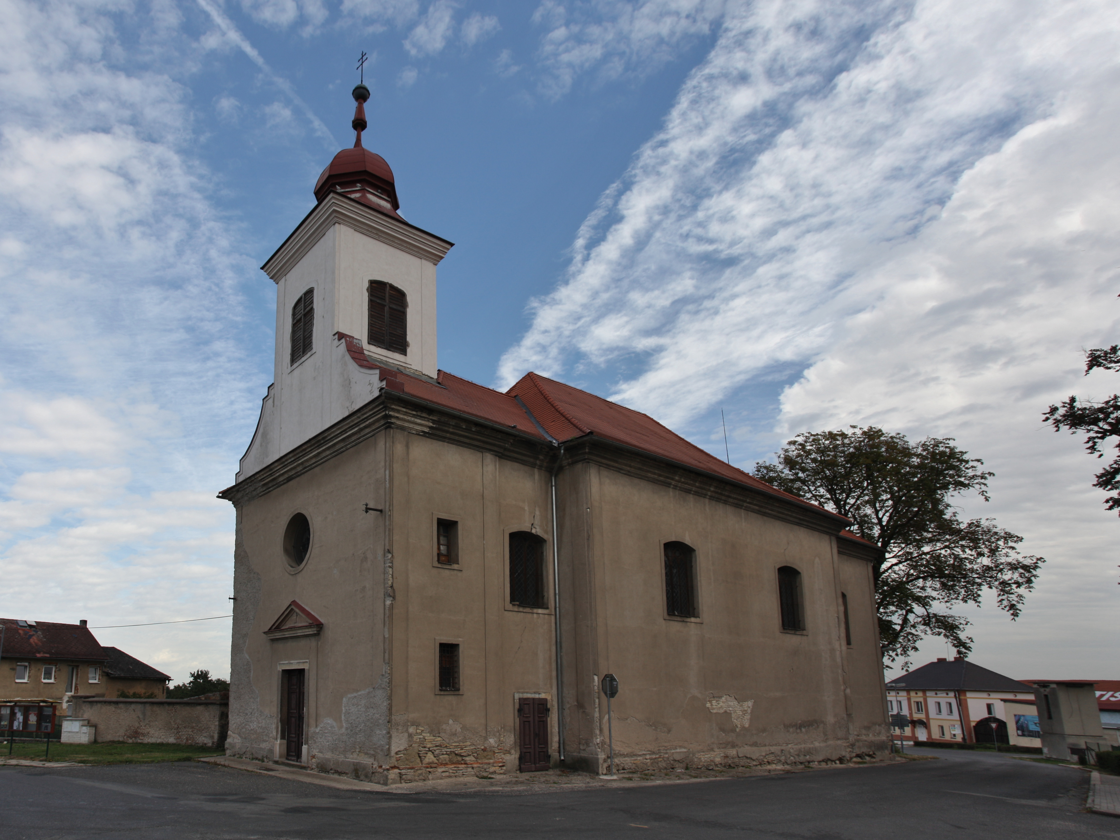 Dolní Slivno, kostel sv. Františka Serafinského na návsi